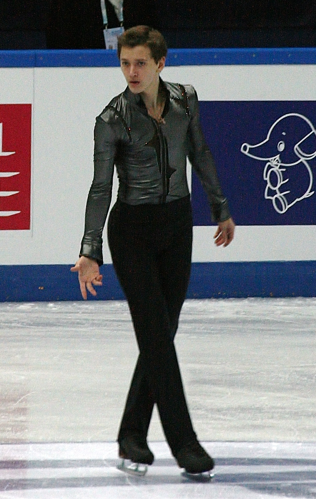 Максим Ковтун (Россия) на финале Гран-при среди юниоров 2012-2013. Произвольная программа.